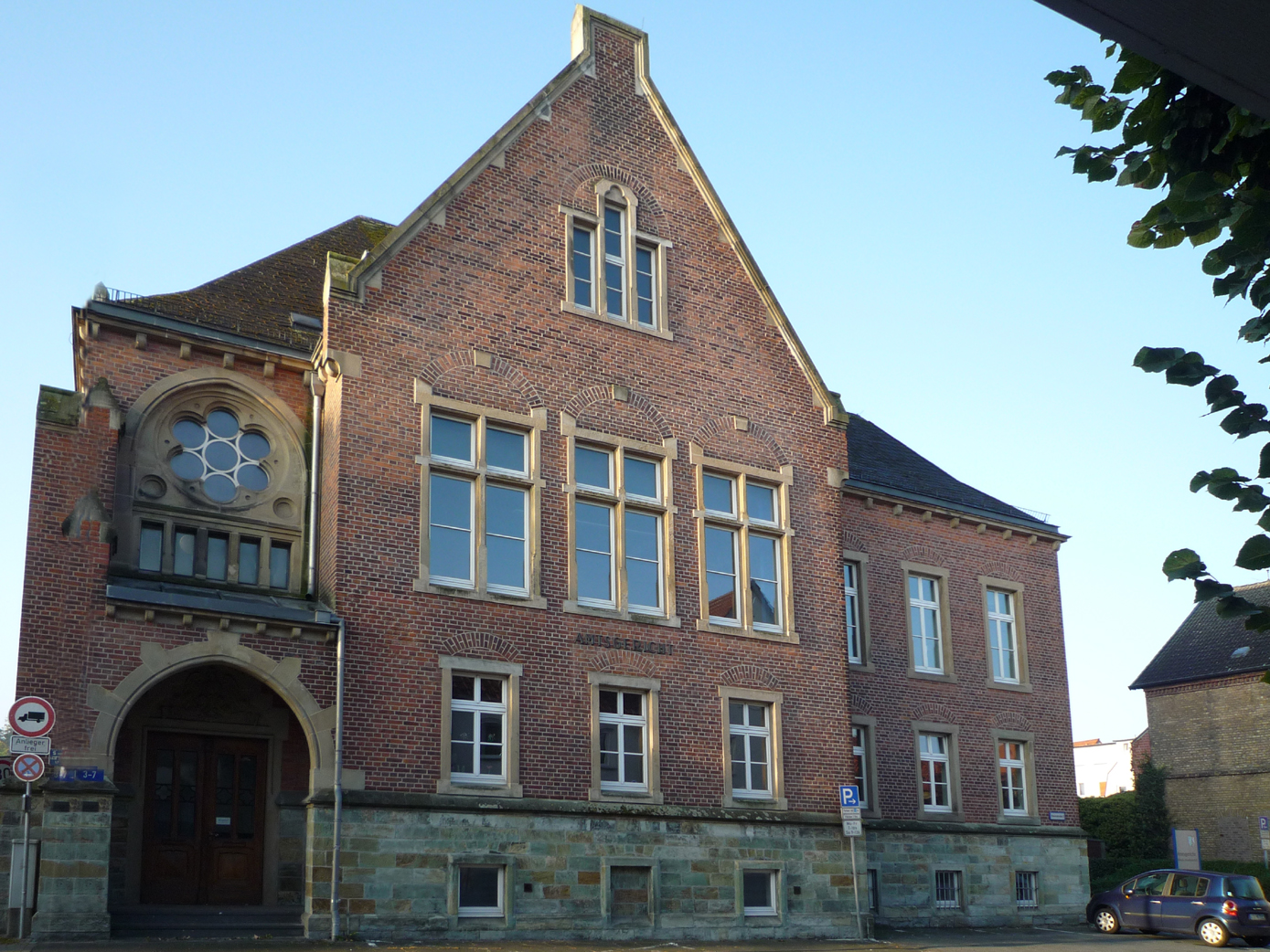 Amtsgerich in Rheda-Wiedenbrück